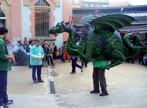 El Drac de Reus a la festa d'aniversari de la Biblioteca Central Xavier Amorós